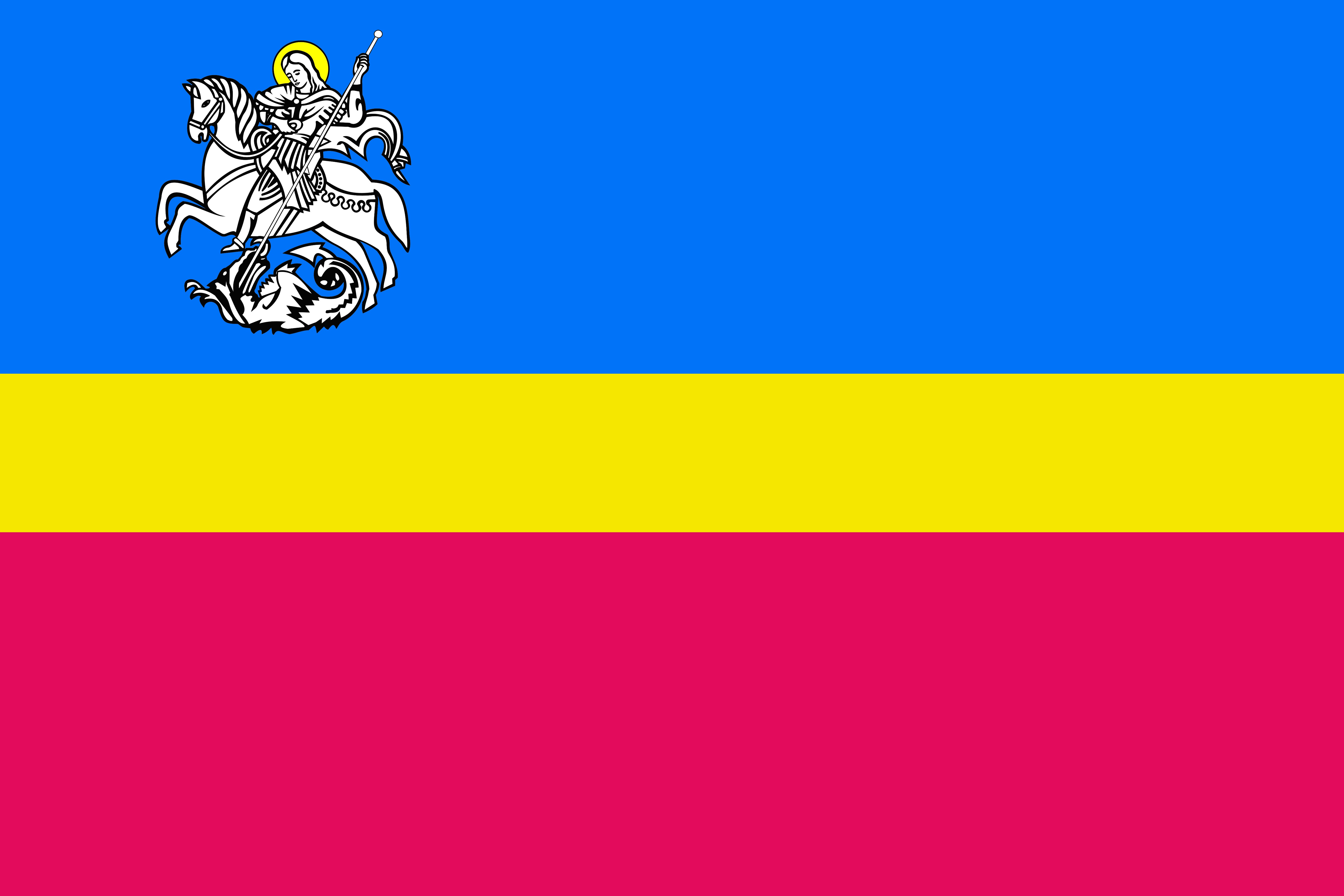 Прапор міста Ніжин